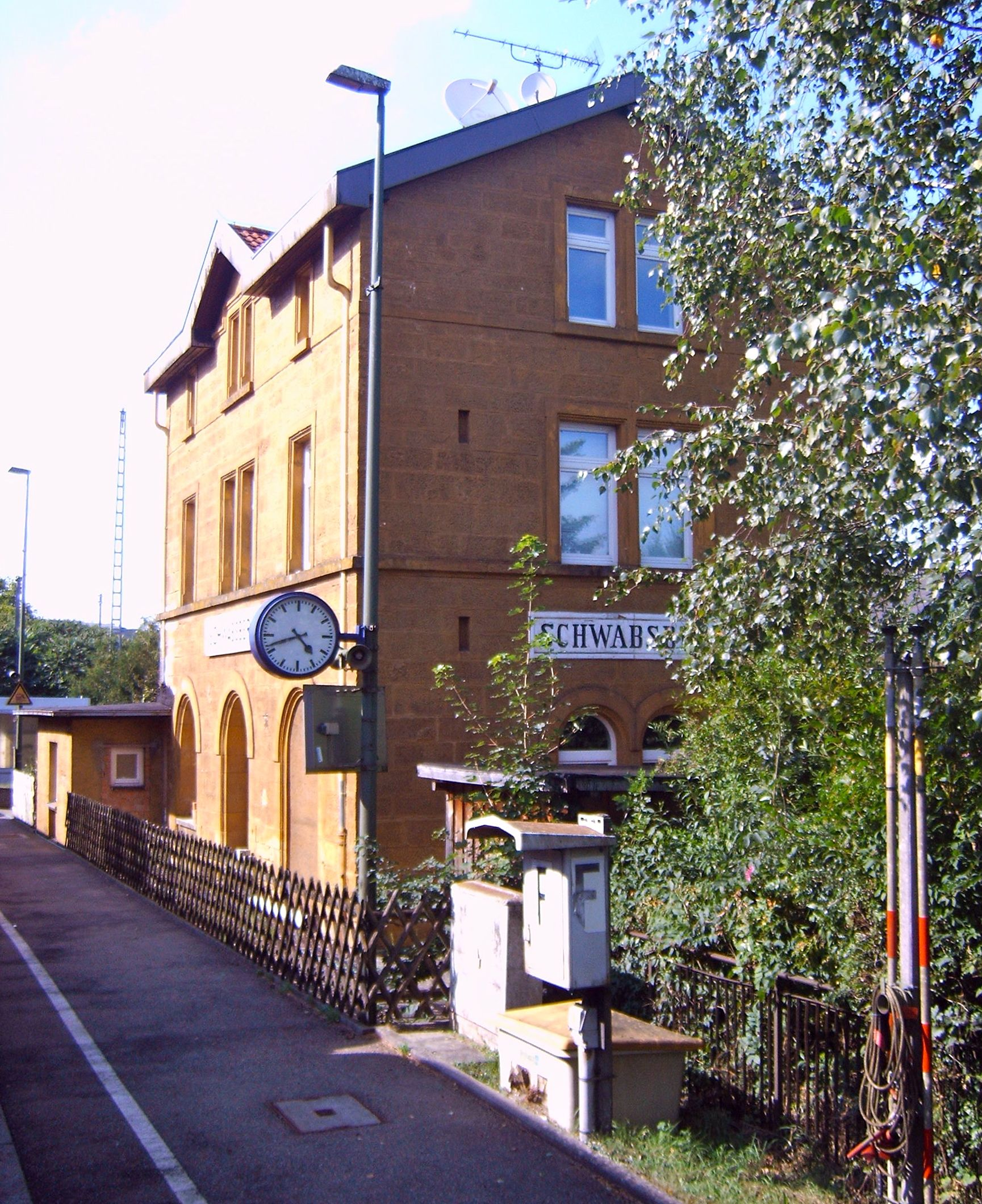 Eisenbahn-Haltepunkt Schwabsberg, Gemeinde Rainau, Obere Jagstbahn